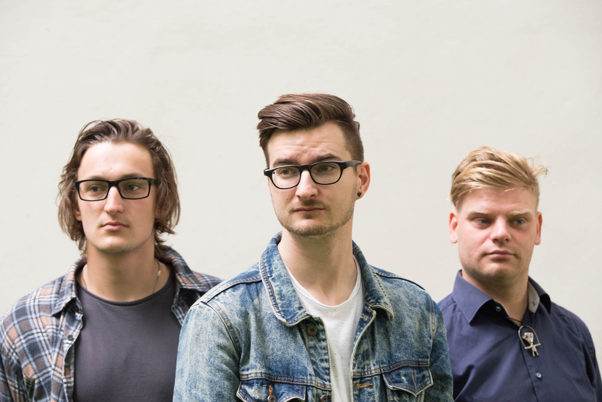 Foto skupiny Fred Madison, zleva doprava: Adam Koš, Miroslav Šulák, Martin Janírek